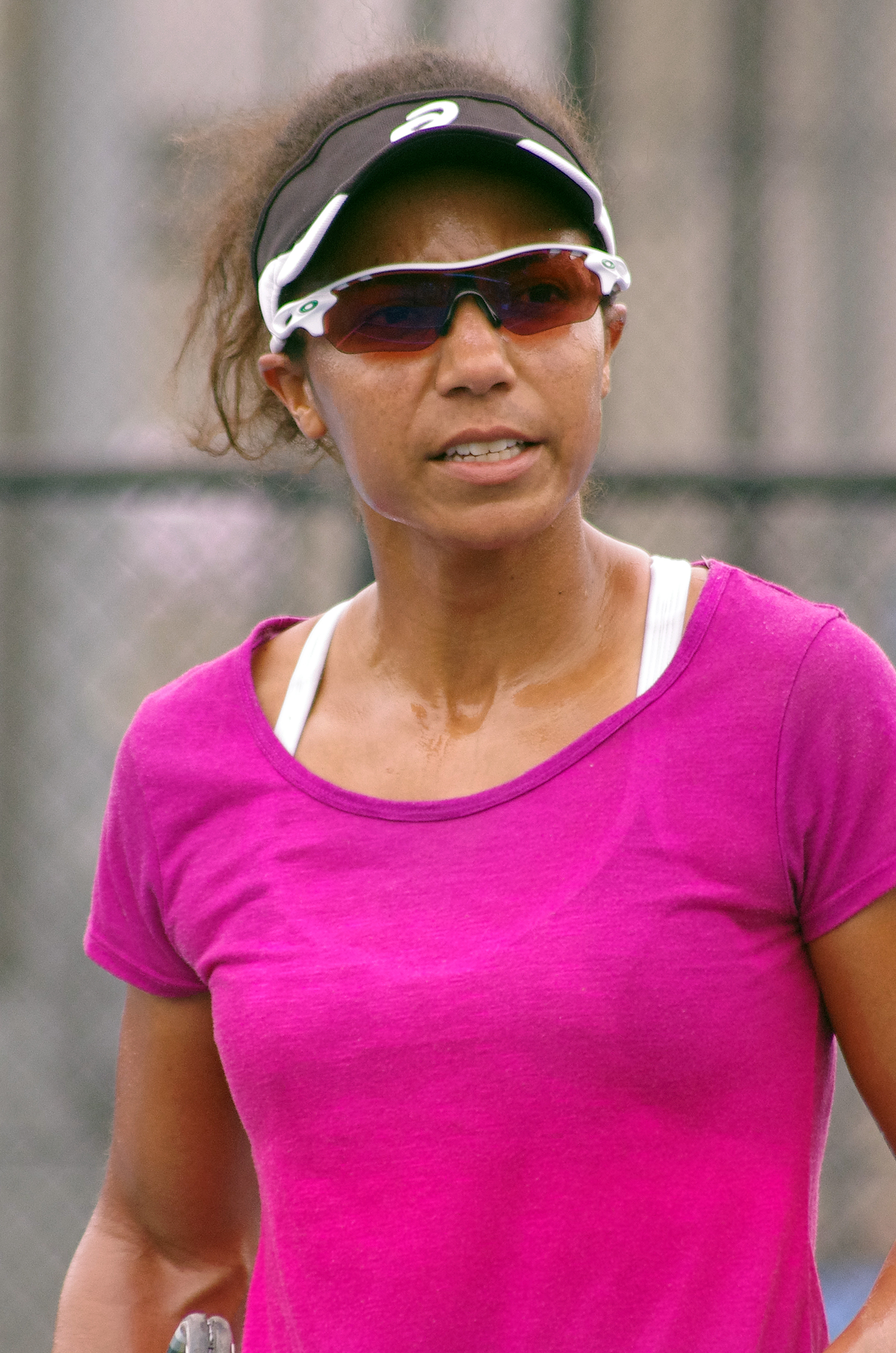 RAQUEL KOPS-JONES